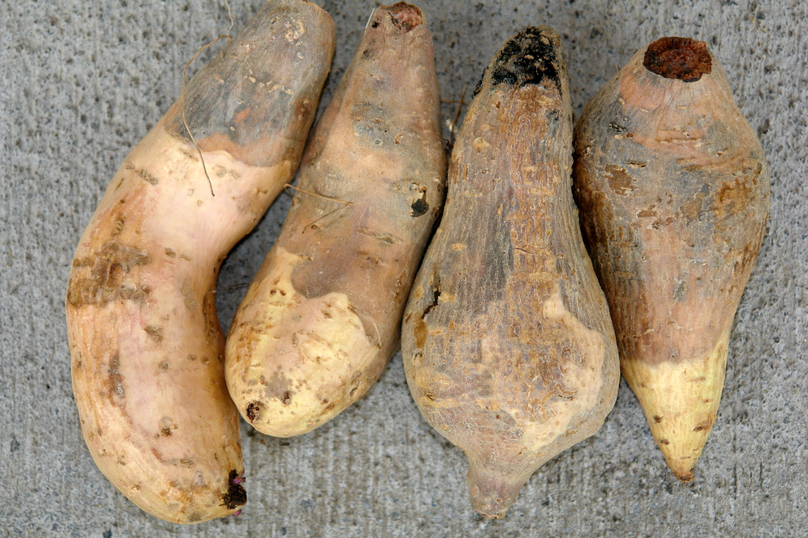 Tubercules de patate douce atteints par la pourriture noire de Java.